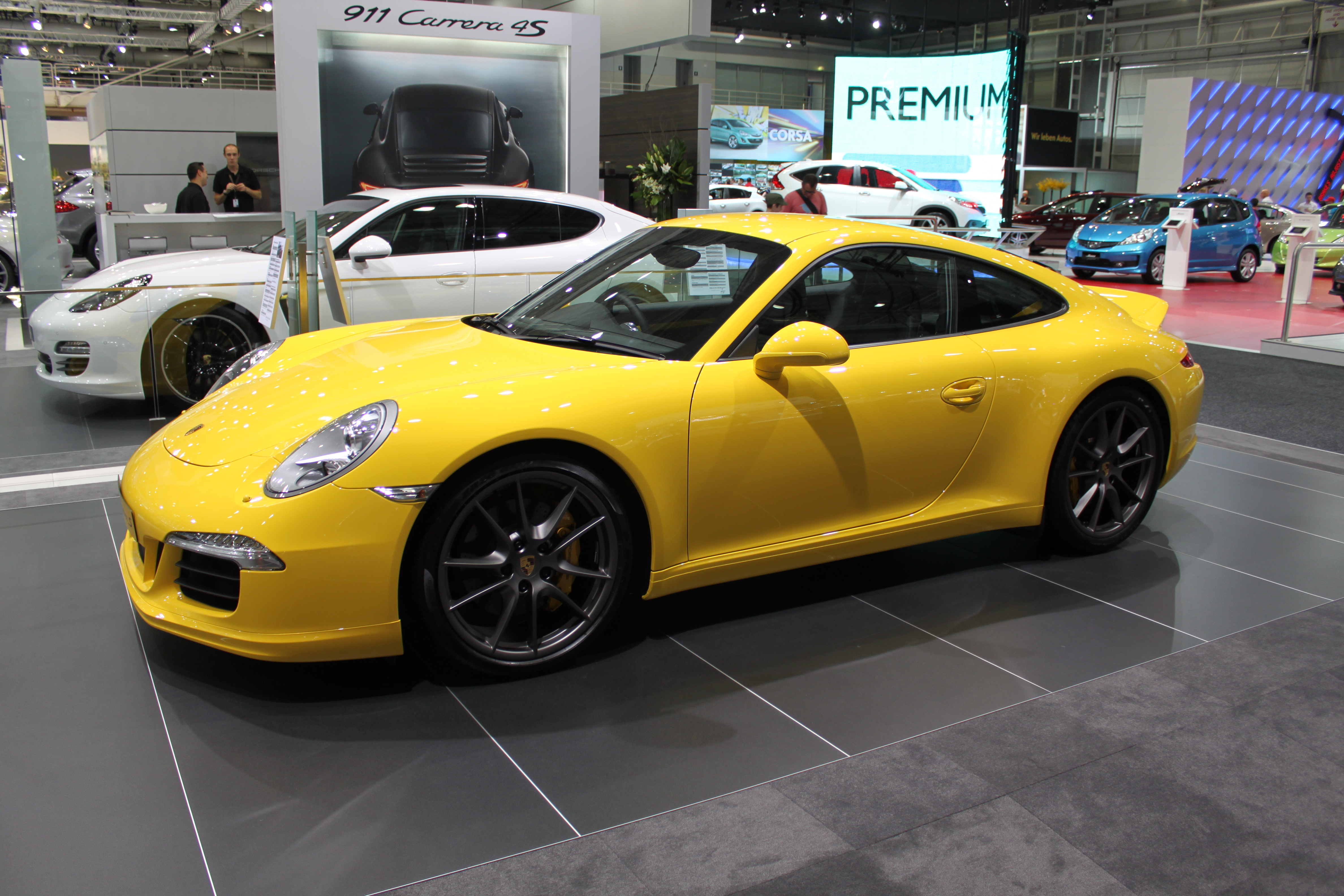 Prosche 911 Carrera GTS